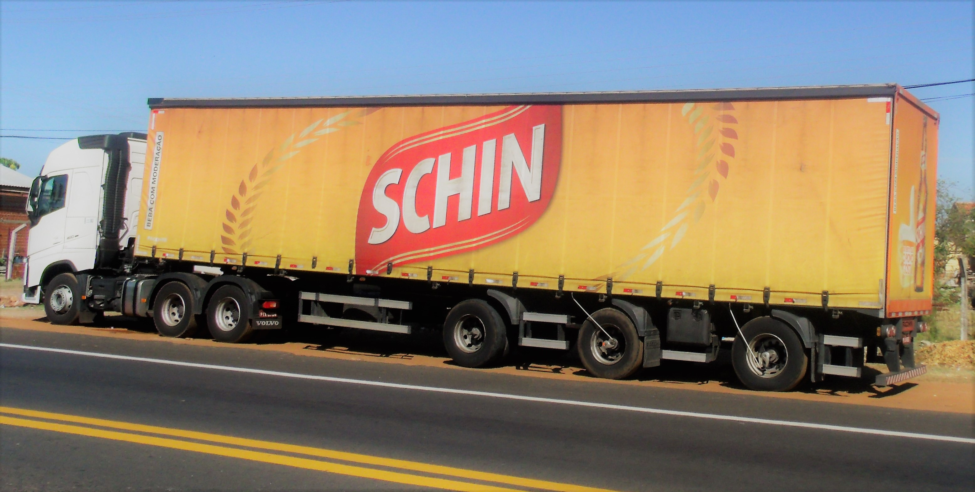 Carreta da Schin, ex-Schincariol em Campo Maior, Piauí, na BR-343, uma rodovia federal no Brasil.